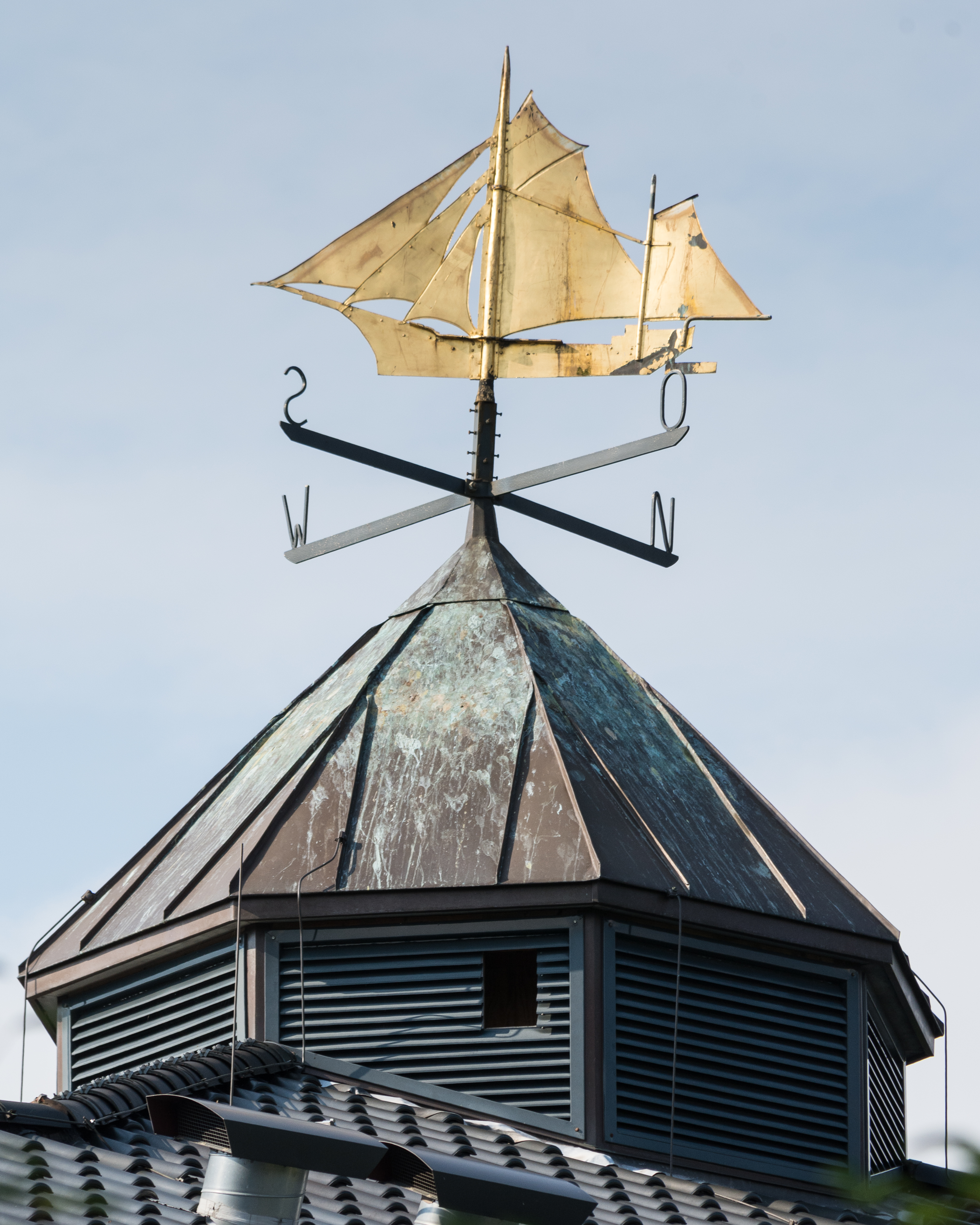 Wetterfahne auf dem Gebäude Oesterleystraße 27 des Gymnasiums Blankenese in Hamburg-Blankenese. This is a photograph of an architectural monument.